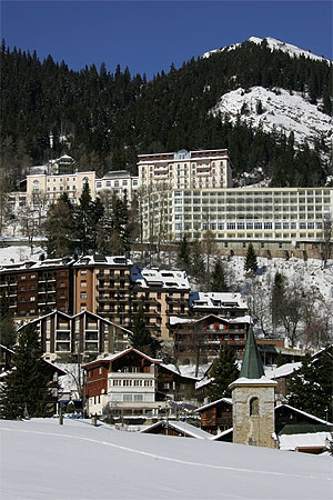 Leysin